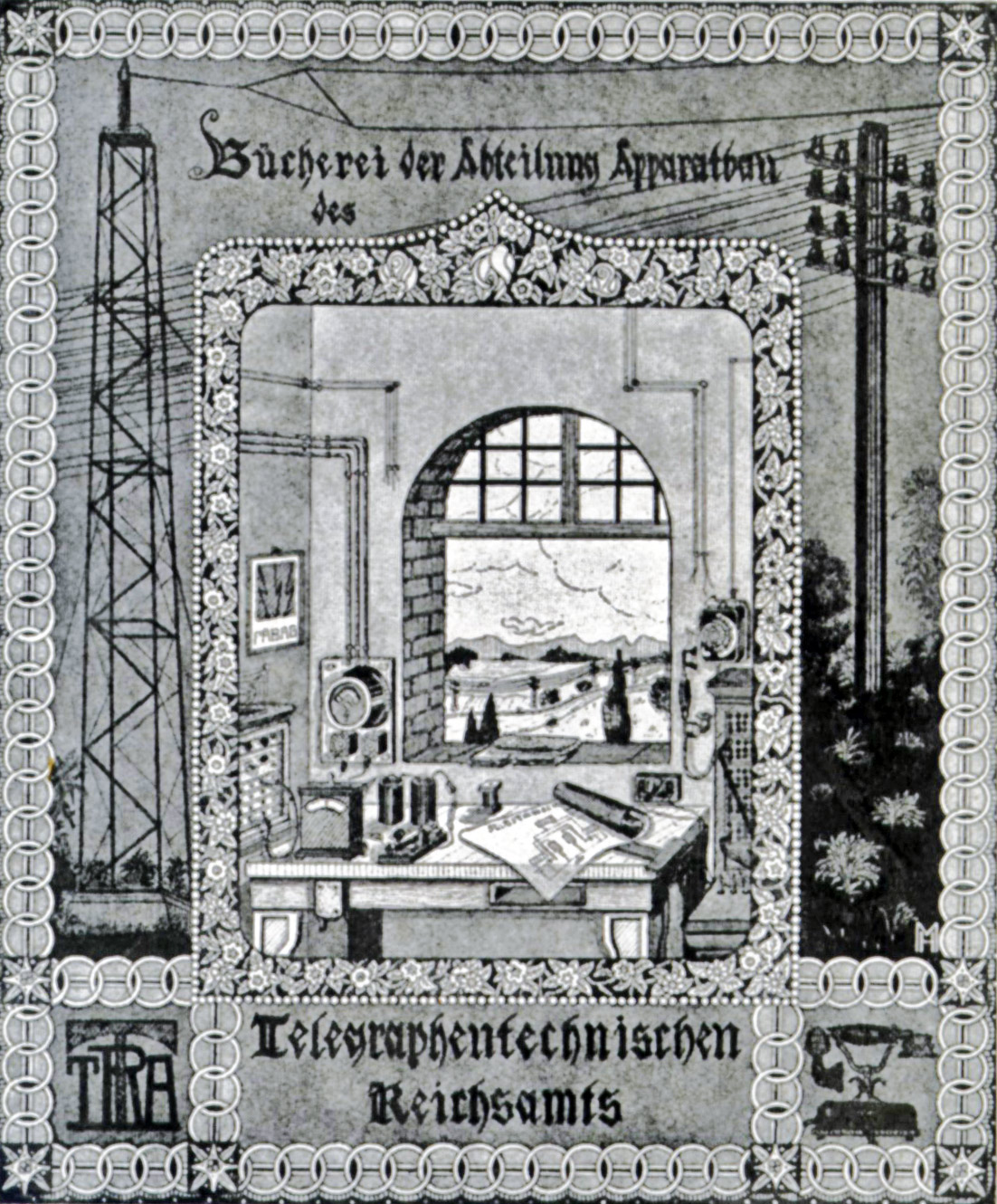 Logo der "Bücherei der Abteilung Apparatbau" im "Telegraphentechnischen Reichsamt" TRA